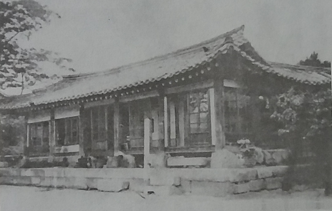 中文（中国大陆）: 1885年由广惠院改建后的济众院